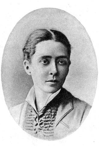 Anna Pavlovna Pribyleva-korba